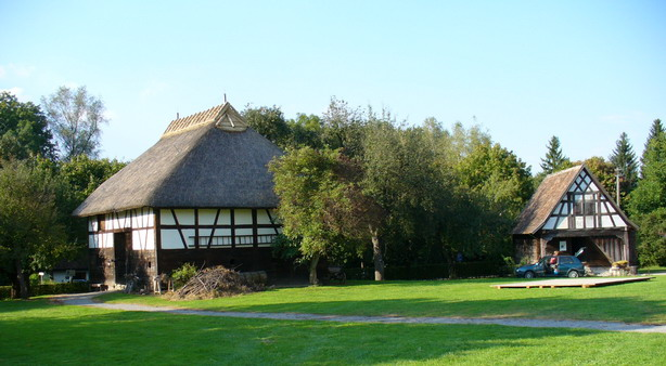 Bad Schussenried, Landkreis Biberach, Freilichtmuseum Kürnbach, Strohdachhaus